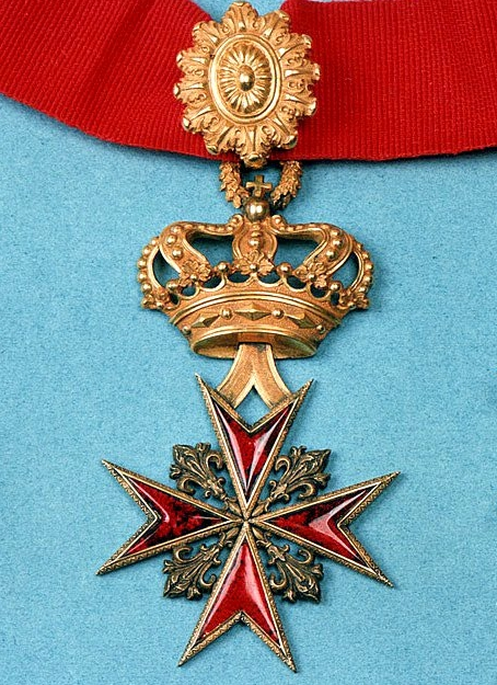 Croce di cav. di giust. dell'Ordine di S. Stefano P. e M. autore della foto: Domenico Serlupi